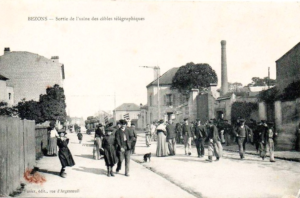 Bezons sortie de l'usine Câbles télégraphiques ; carte postale ancienne